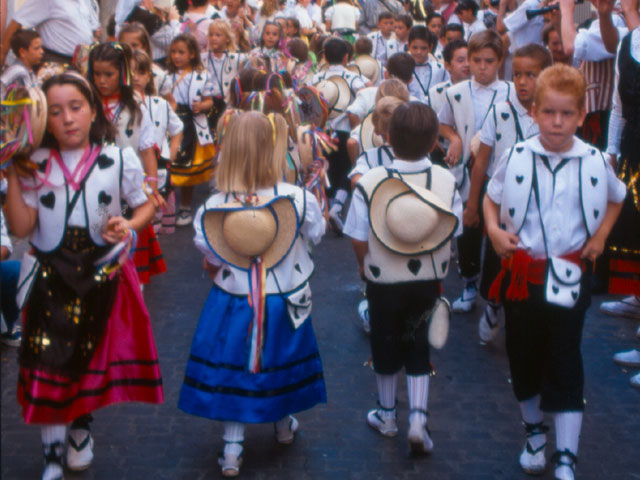 Pastorets en la processoneta del matí d'Algemesí.